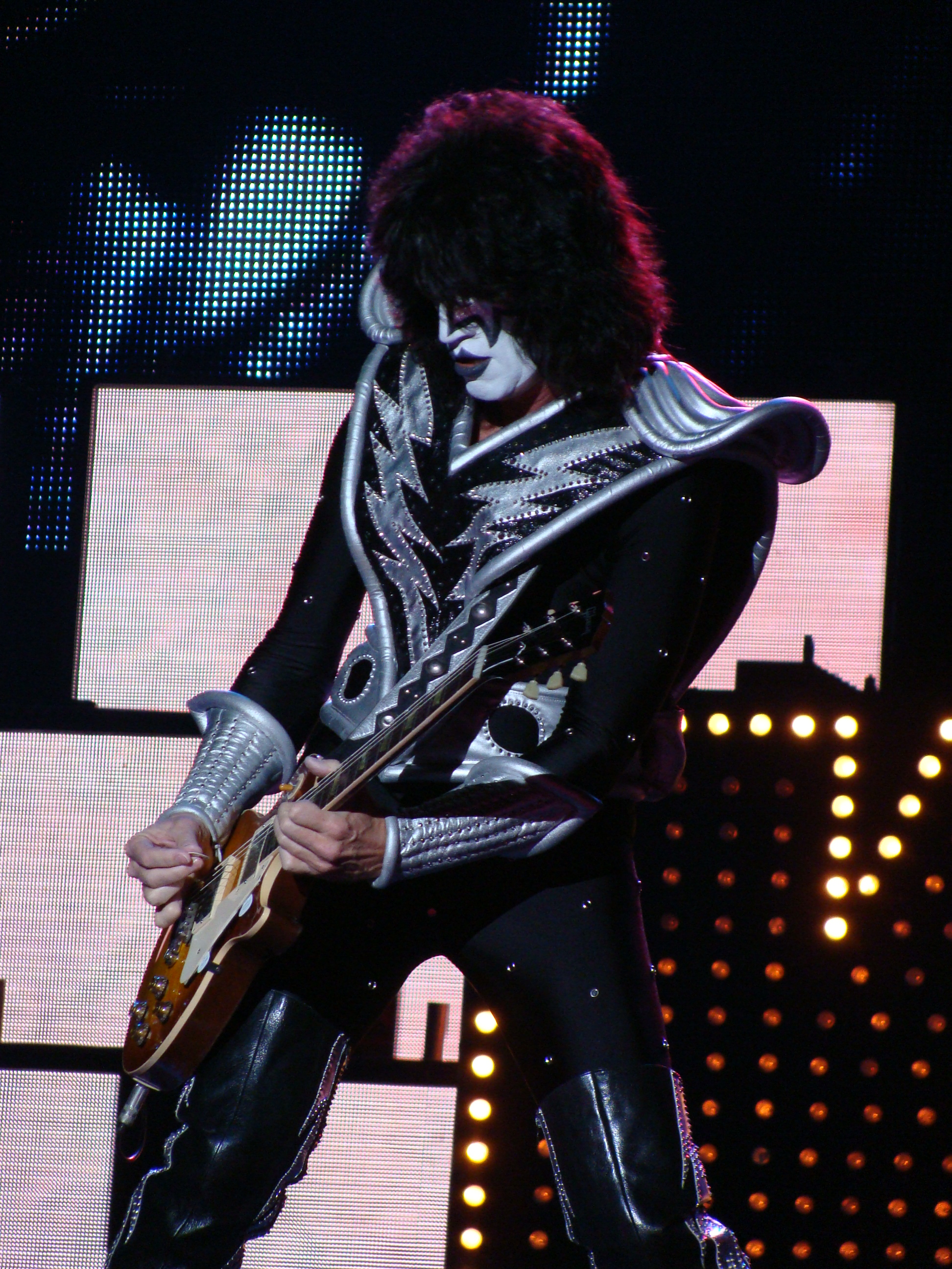 Tommy Thayer, en una actuación del grupo KISS en Vitoria-Gasteiz, en el Azkena Rock Festival.